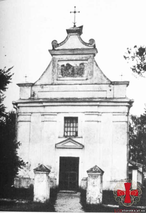 Католицький костел в с.Лисин. Фото 1930 р. Костел був знищений в 1943 р.